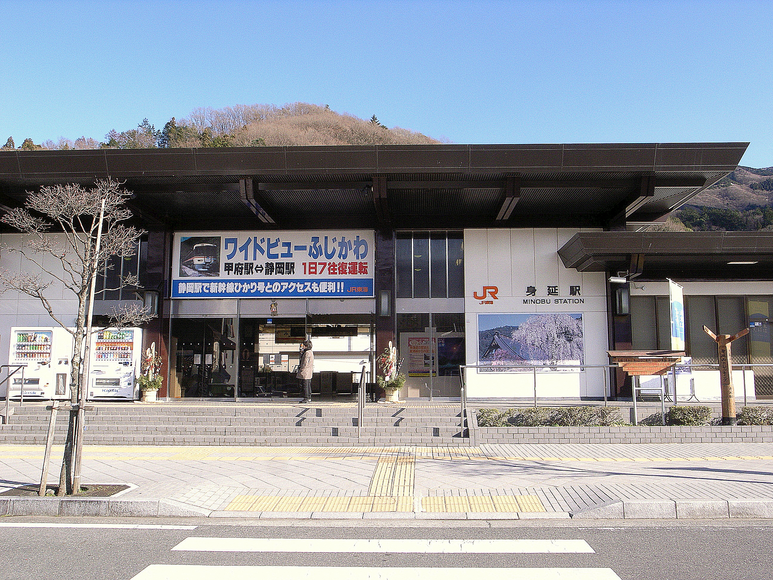 身延線身延駅駅舎